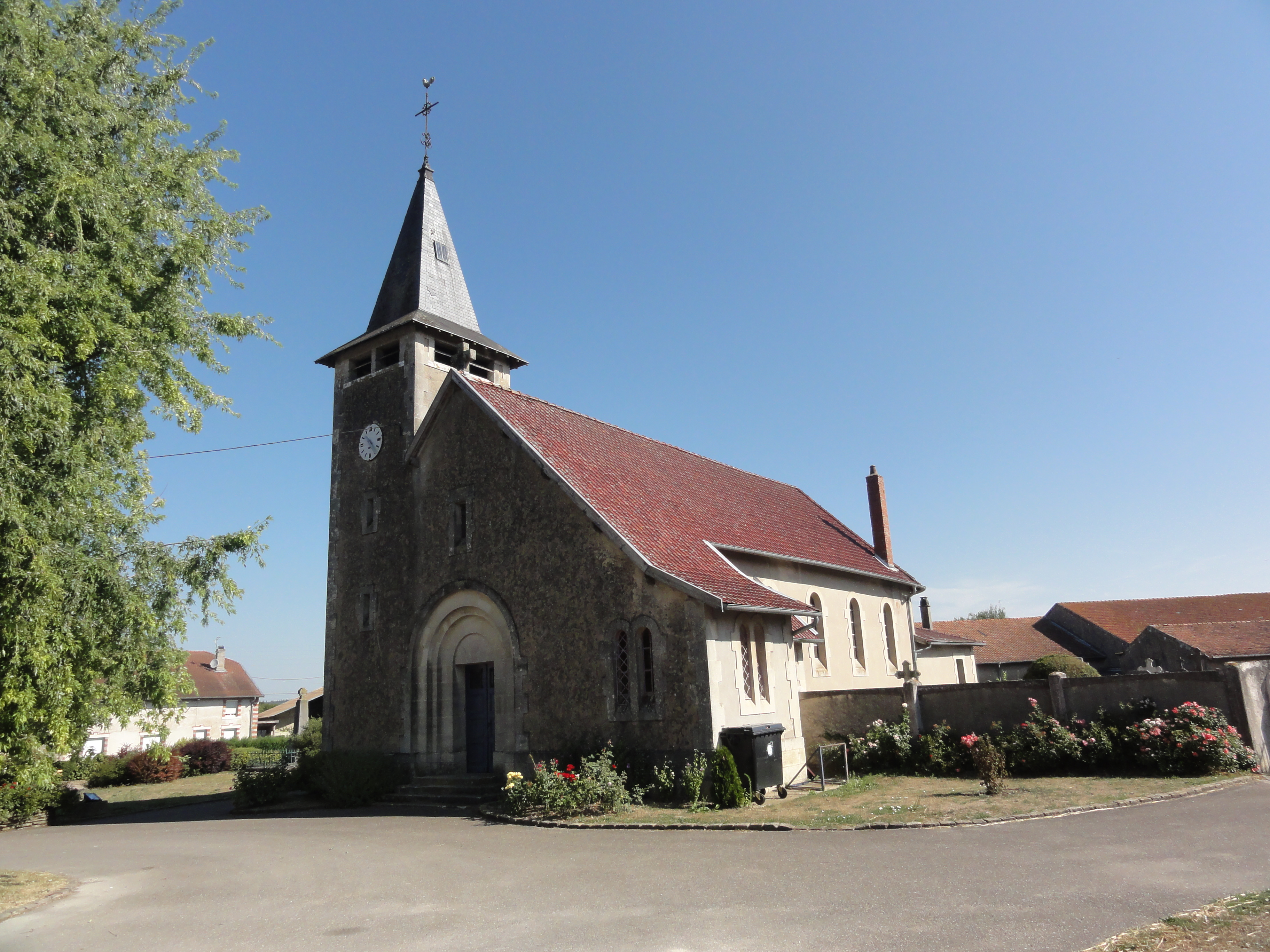 Marre (Meuse) église